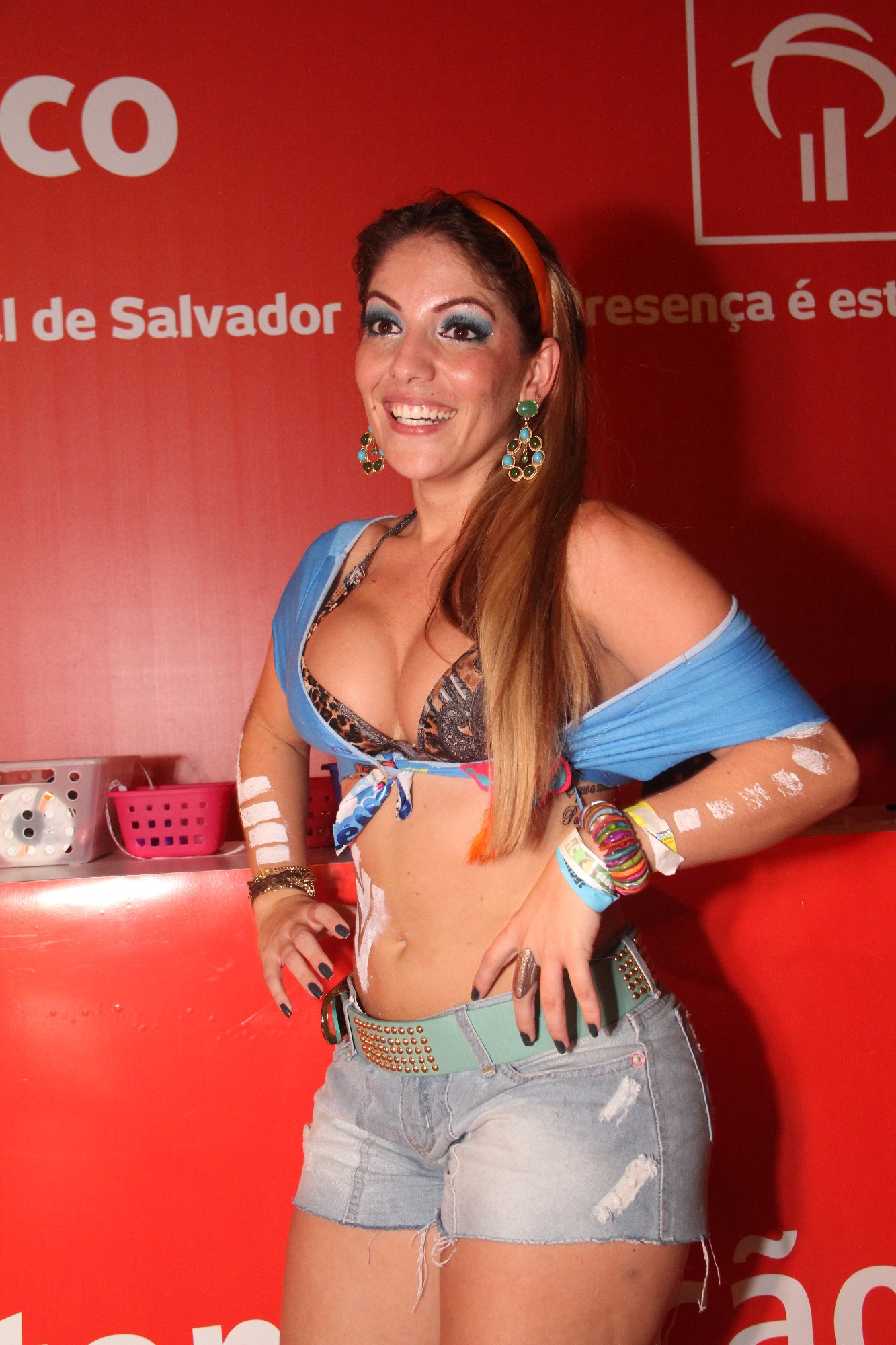 Anamara Barreira